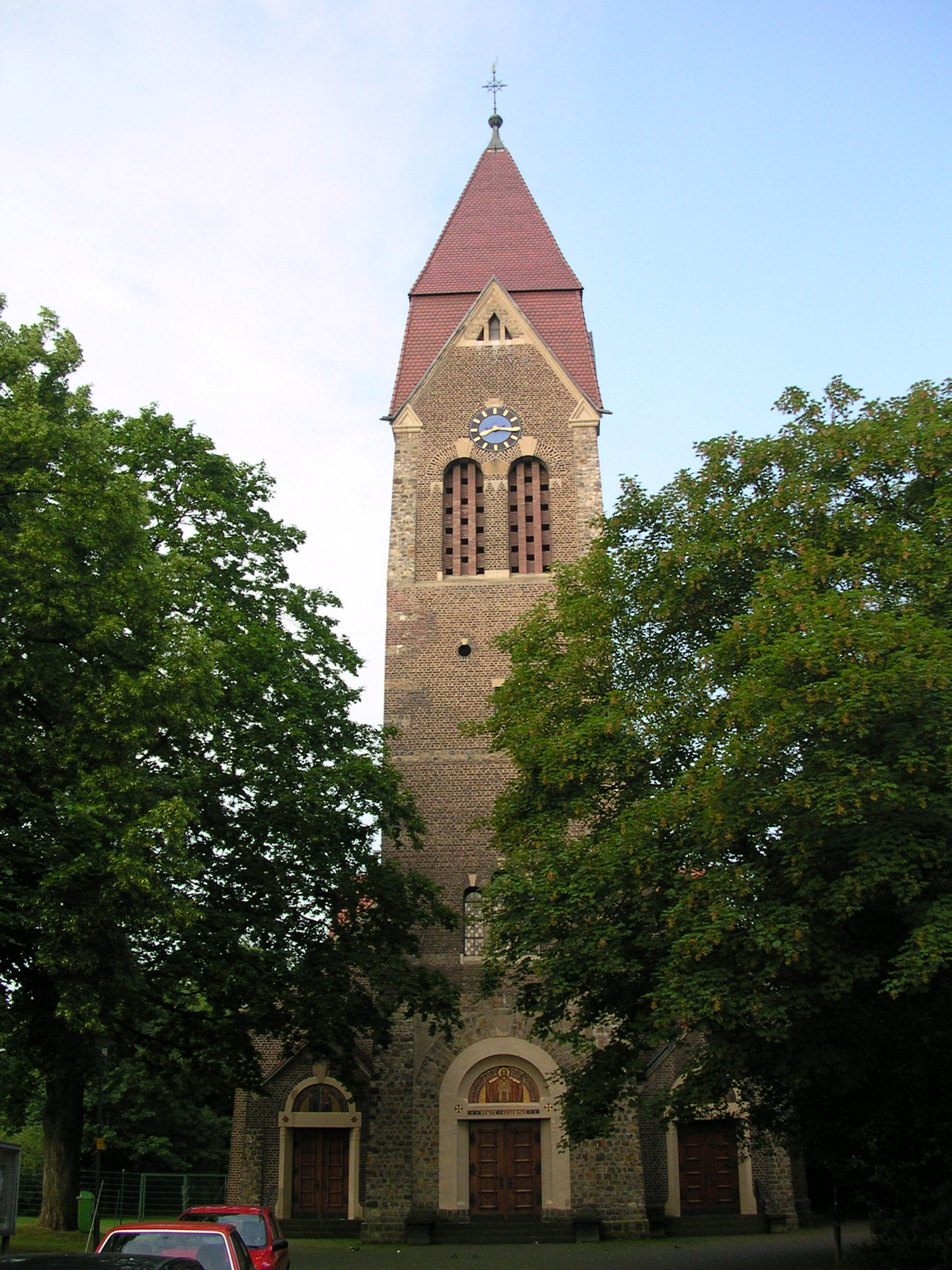 Eschweiler Bergrath, katholische Antoniuskirche